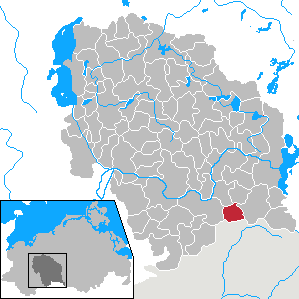 Wahlstorf in Mecklenburg-Vorpommern - District Parchim